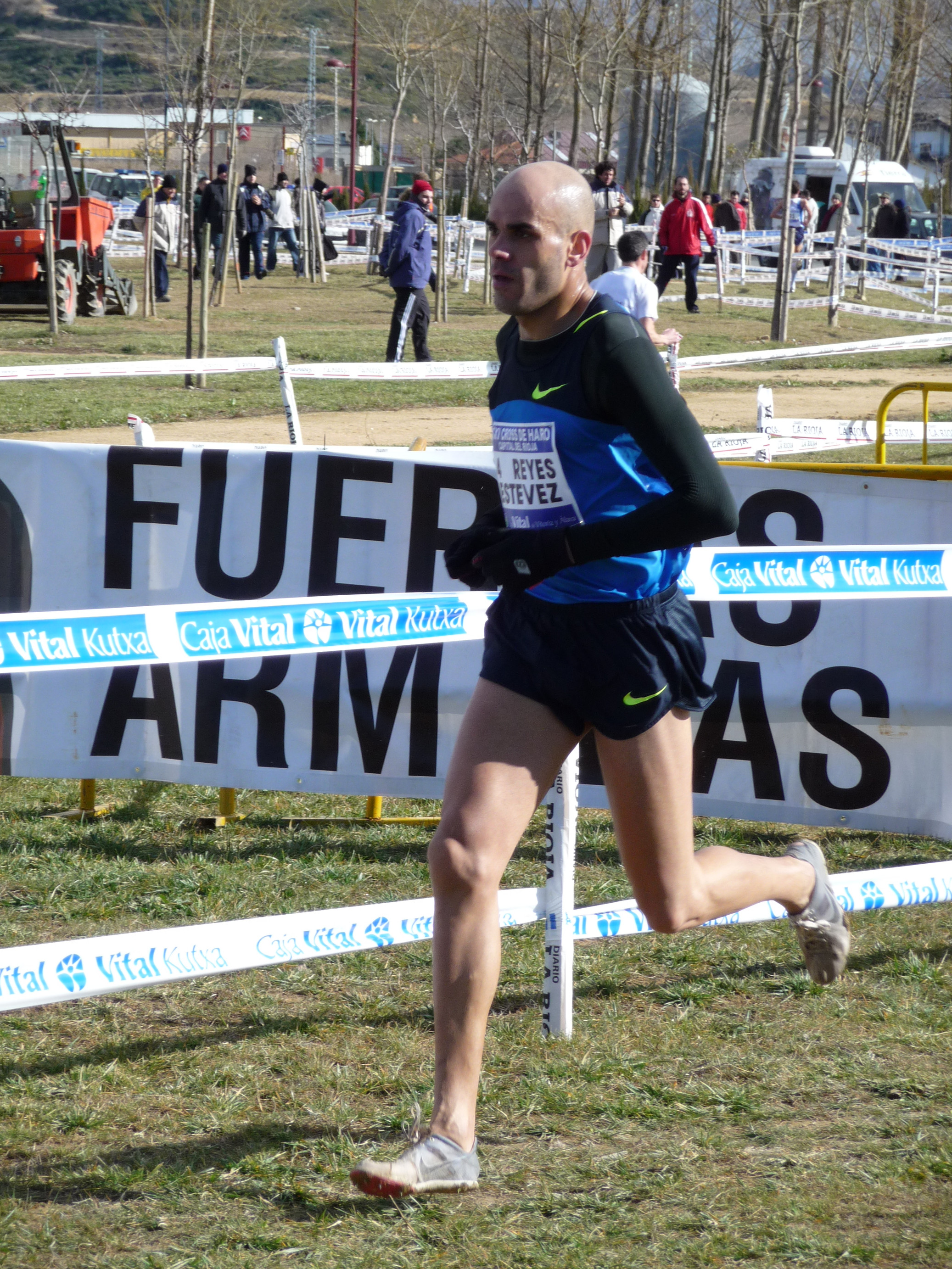 Reyes Estévez en el cross Ciudad de Haro